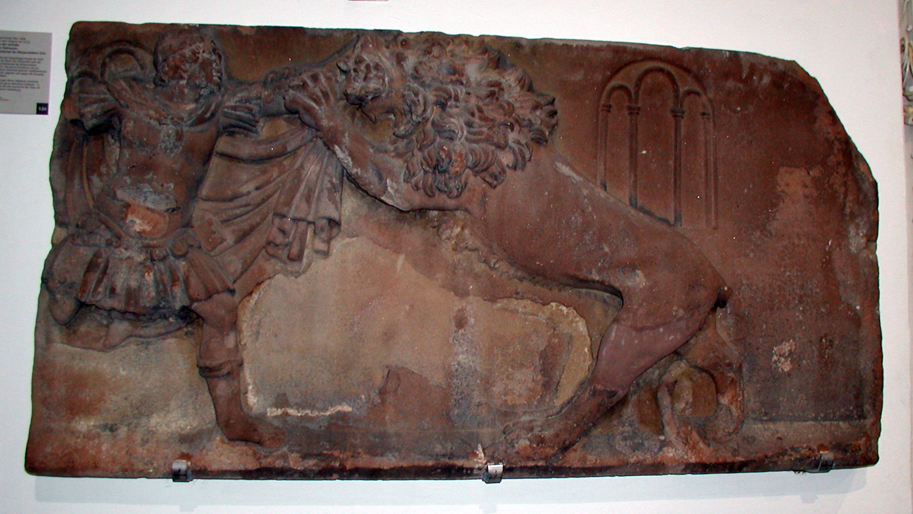 Bürgermeister Gryn und sein Löwenkampf, Relief Zeughaus-Köln